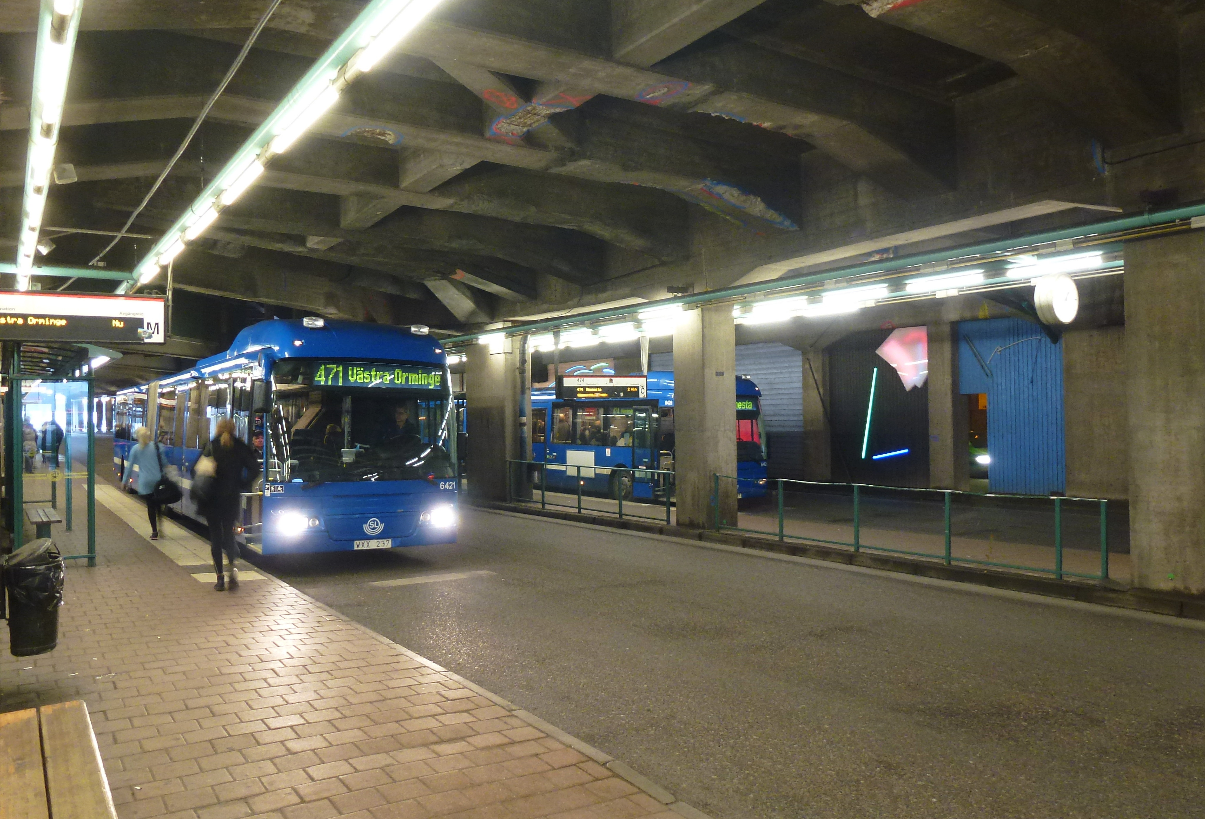 Slussens bussterminal